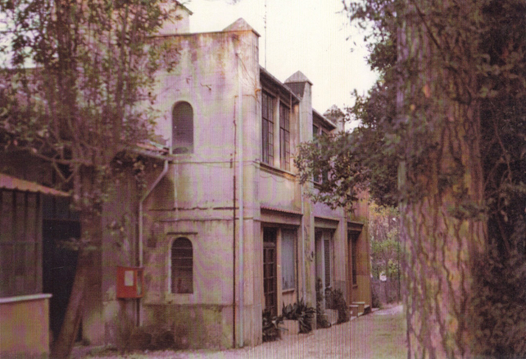 Studio Nr. 12 des Malers Francesco Trombadori auf dem Gelände Villa Strohl-Fern